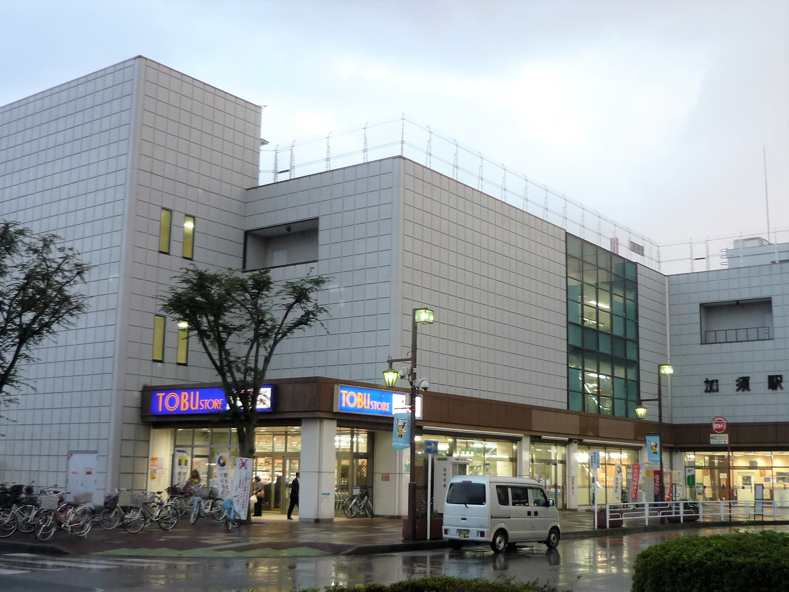 東武ストア かぞマイン店